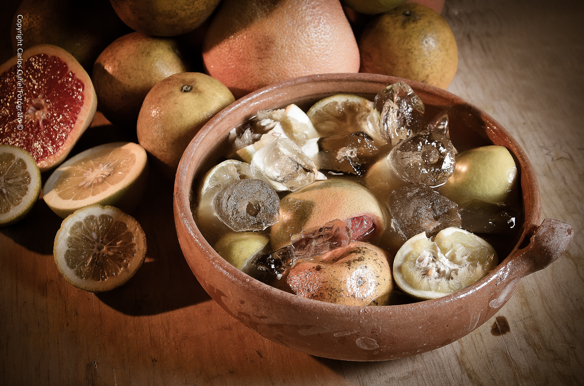 Bebida típica y exclusiva de La Barca, Jalisco. Creada por el Sr. Antonio Barocio en el famoso restaurant "El Arroyo de Comala".